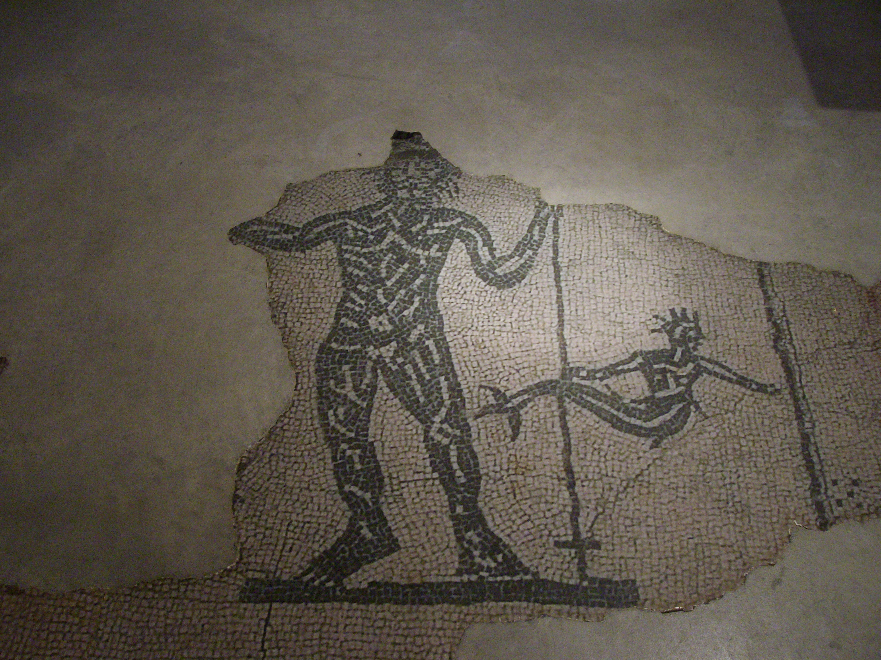 La ermita, que data del siglo X, fue edificada sobre los restos de una villa romana. De estos vestigios romanos podemos ver, dentro de la capilla, una imagen de un mosaico con la representación del dios Neptuno y una tritonesa que pavimenta el suelo. El mosaico original se exhibe en el Museo de Historia de Sabadell desde el año 1934.